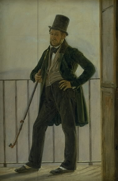 The Danish painter Albert Küchler